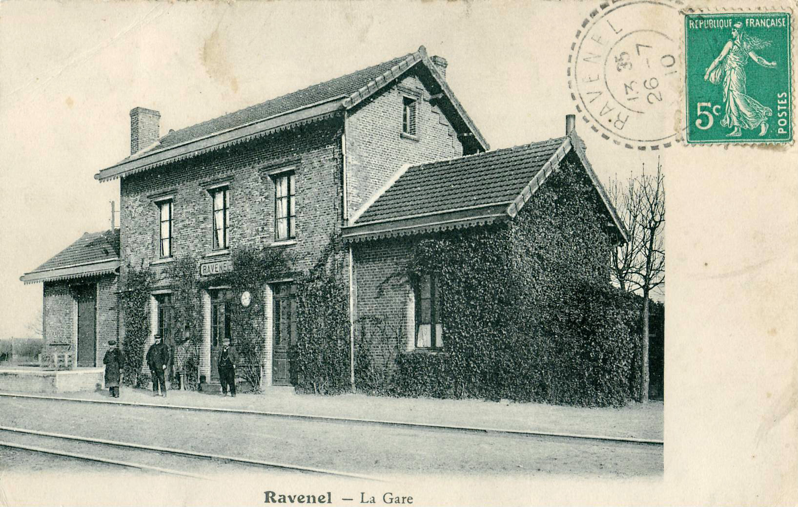 Carte postale ancienne, sans mention d'éditeur : RAVENEL - La GareIl s'agit d'une gare de la ligne de chemin de fer secondaire à voie métrique Ligne Estrées-Saint-Denis - Froissy - Crèvecœur-le-Grand